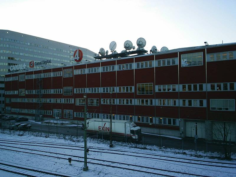 TV4-huset vid frihamnen i Stockholm. Foto: CNB